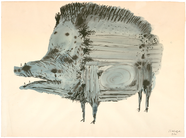 Sans titre - encre de Chine et peinture à l’eau sur papier